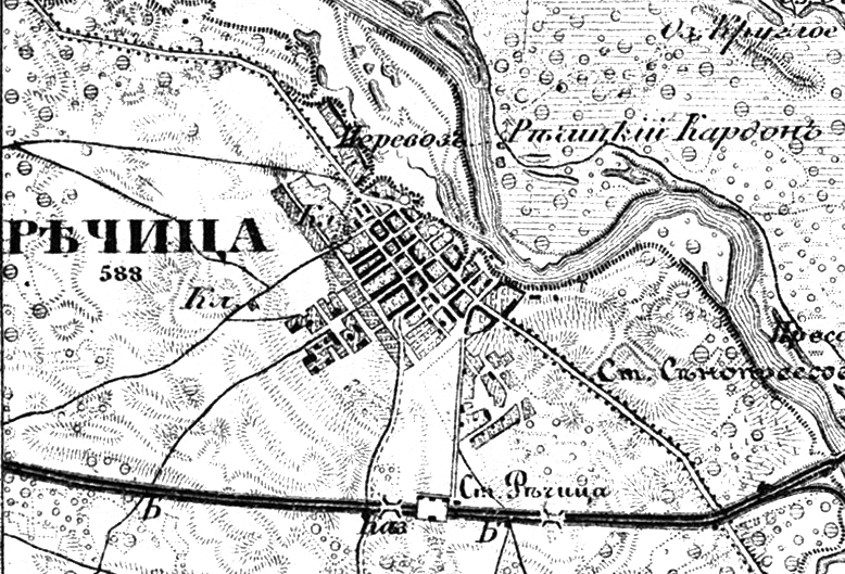 План Речицы по стостоянию на 1867 год